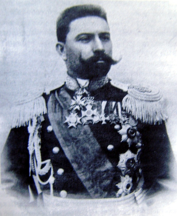 Рачо Петров (1861-1942)